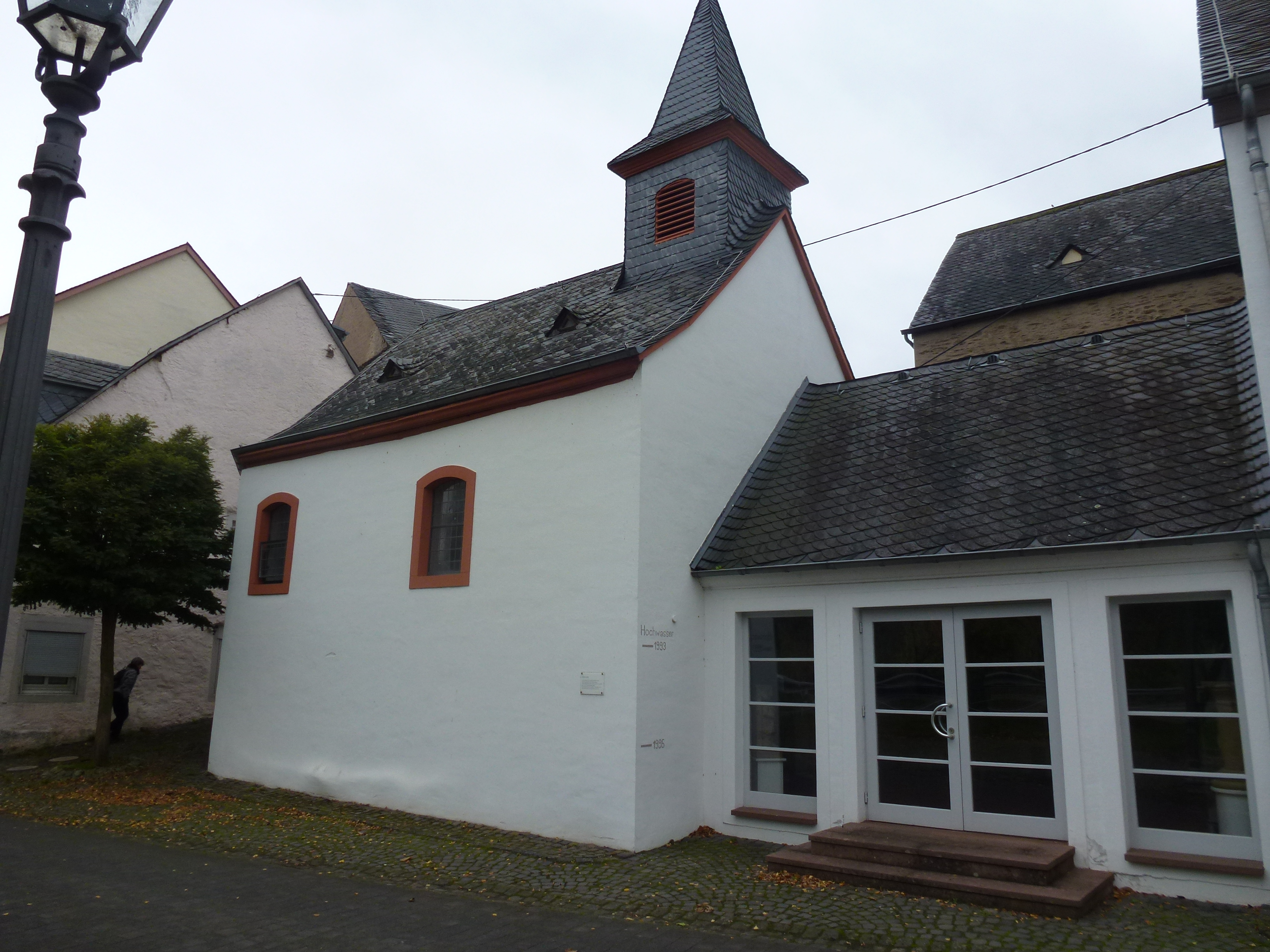 Euchariuskapelle, heute Heimat- und Weinmuseum Leiwen